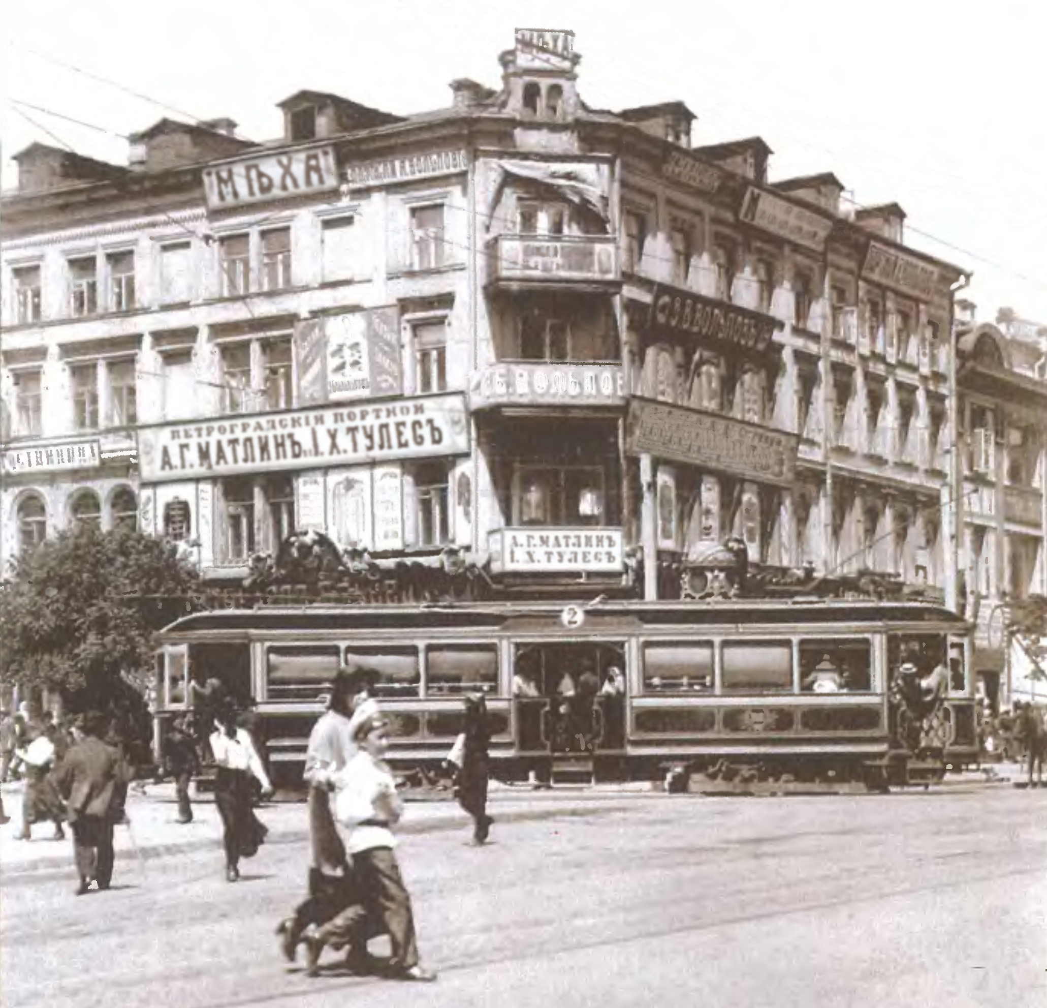 Прибутковий будинок на ділянці, де розташований ЦУМ (1916)